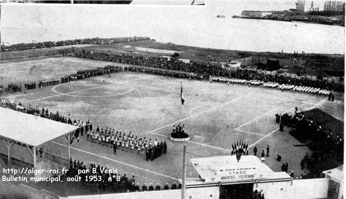 Stade marcel cerdan in august 1953